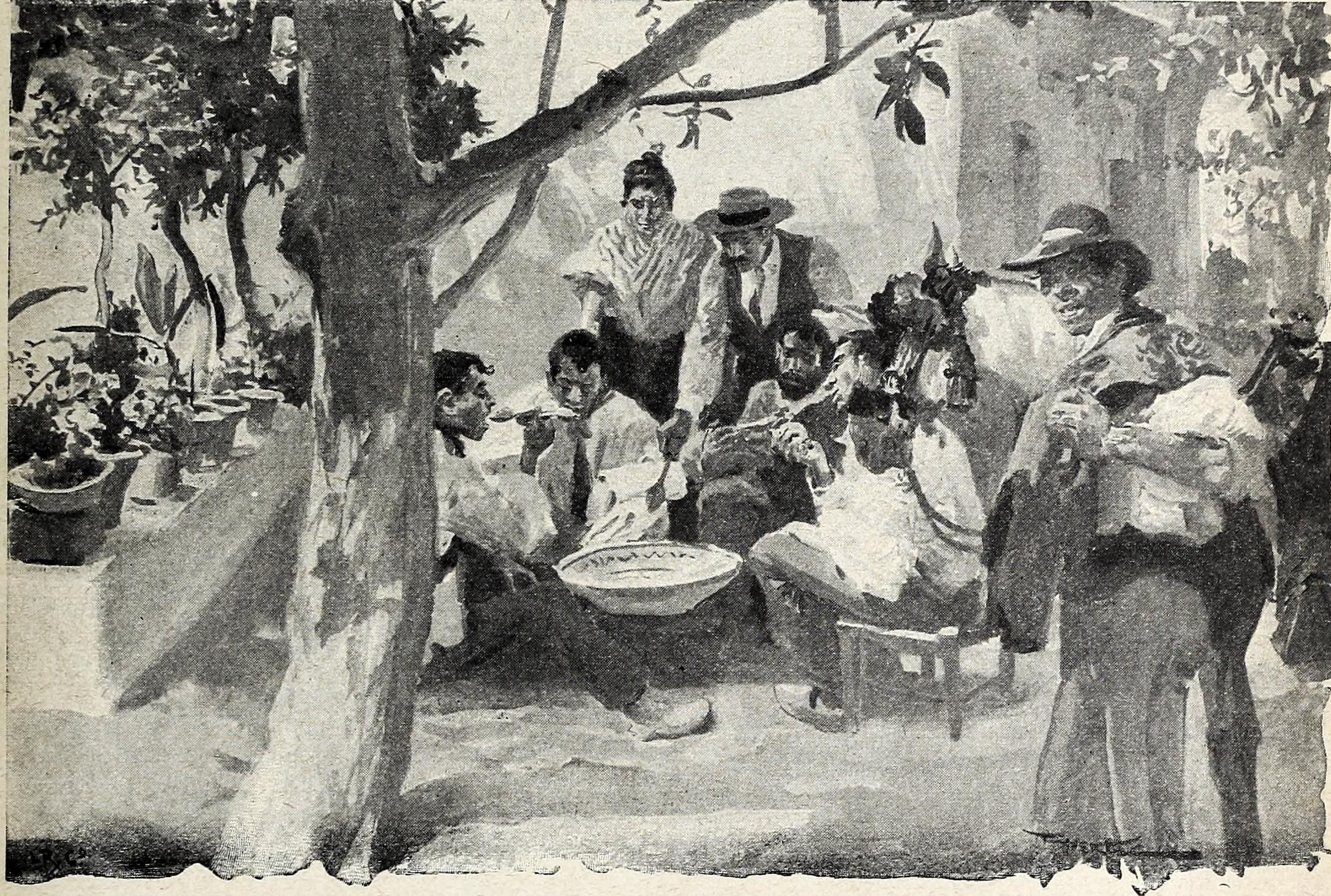 Cosas de verano VI. El gazpacho.